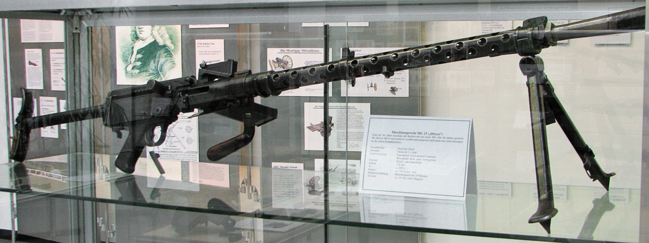 Dieses Bild zeigt ein MG13.